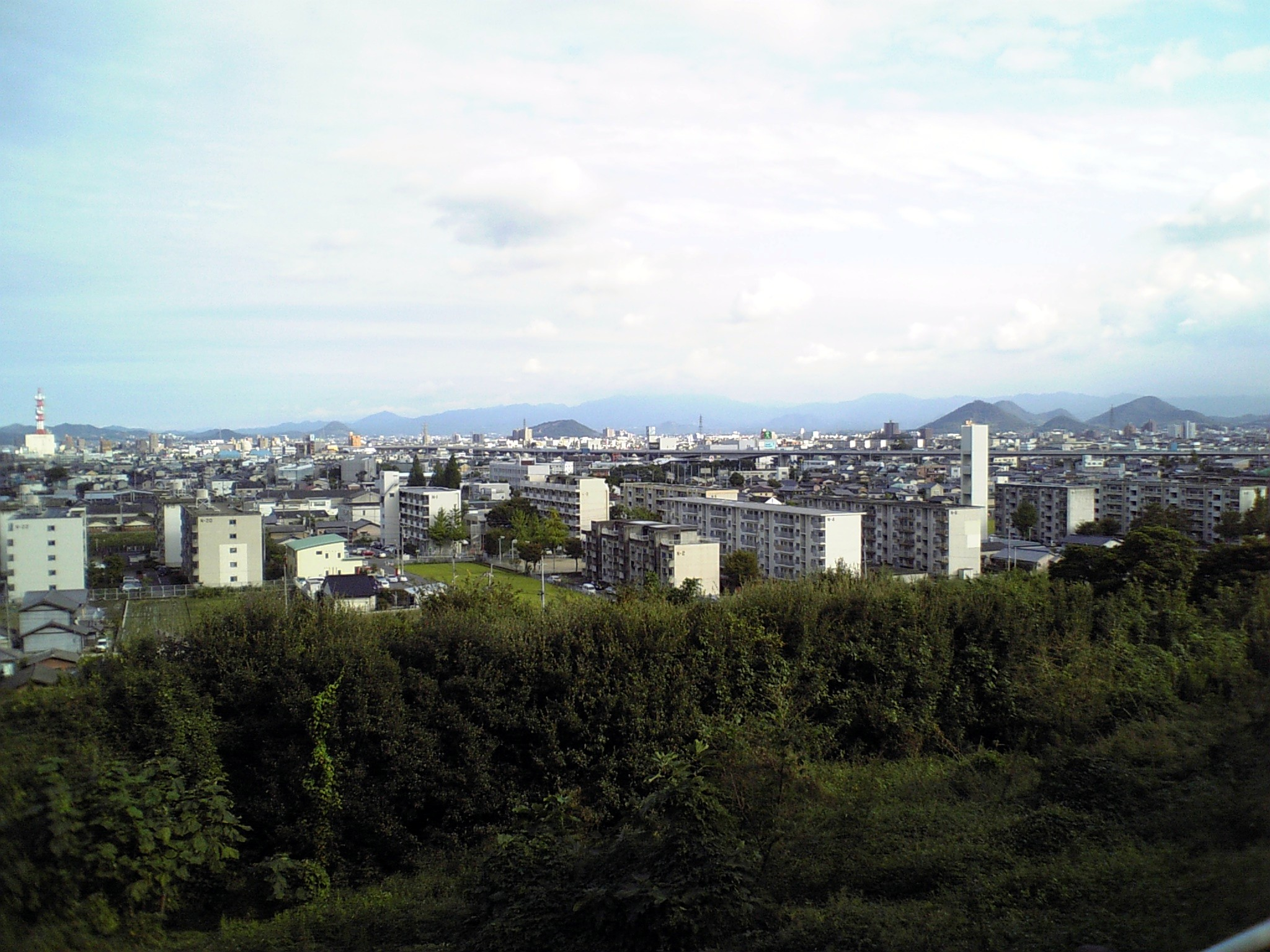 nishigasuga danchi view at Mt. jyoganjiyama.